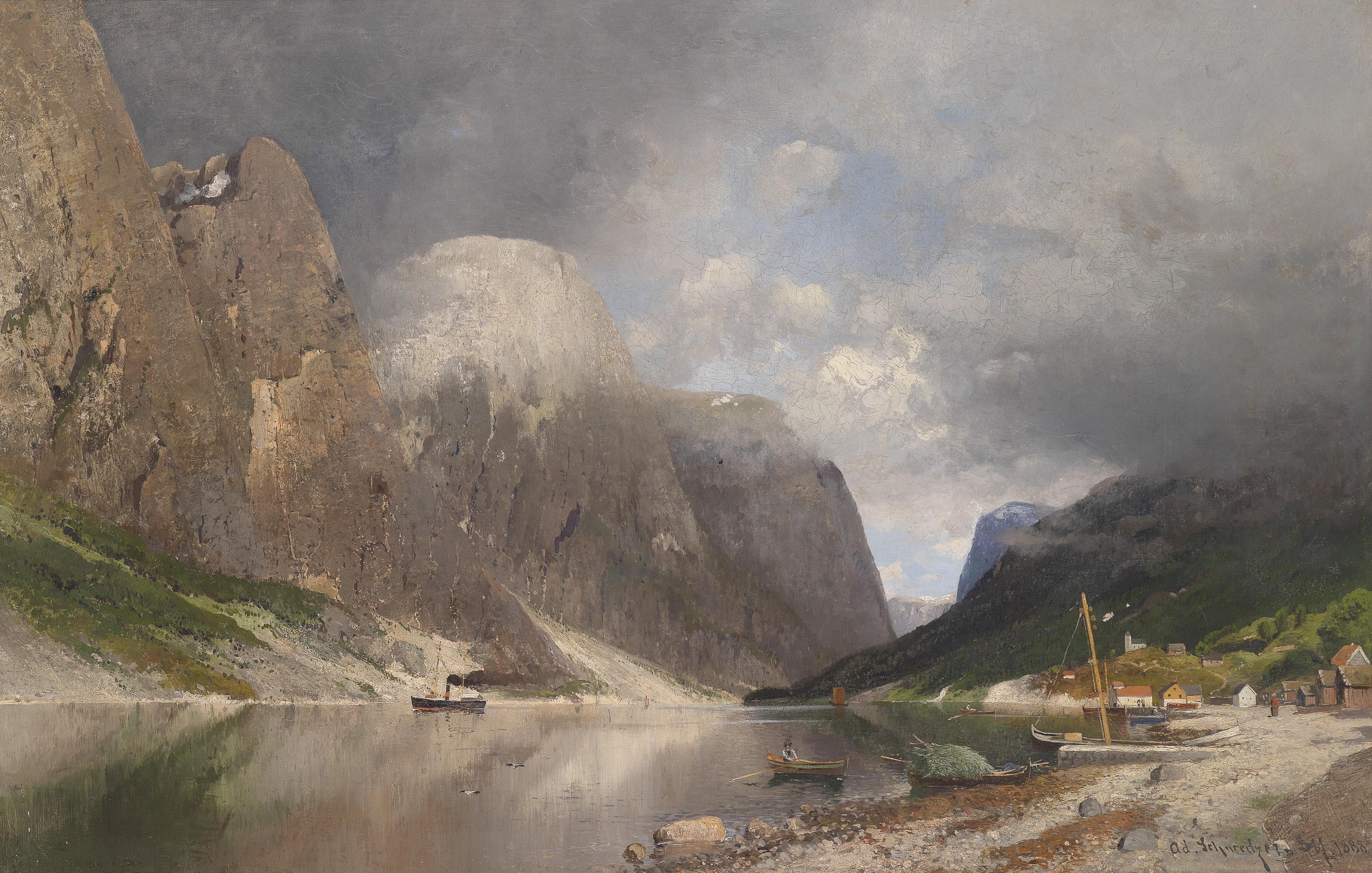 Fjordlandschaft, signiert, datiert Ad. Schweitzer Ddf. 1888, Öl auf Leinwand, 66 x 101 cm